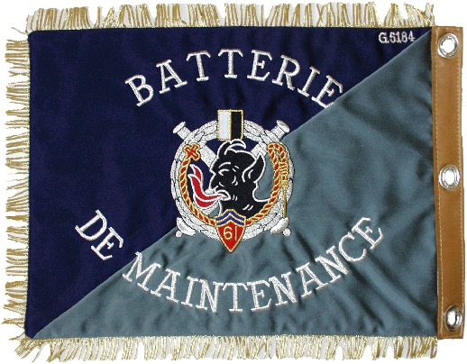 Fanion de la batterie de maintenance du 61ème RA